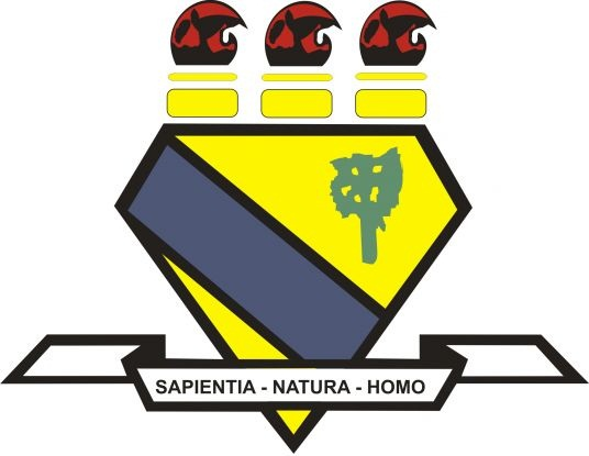 Brasão antigo da Universidade Federal de Roraima.